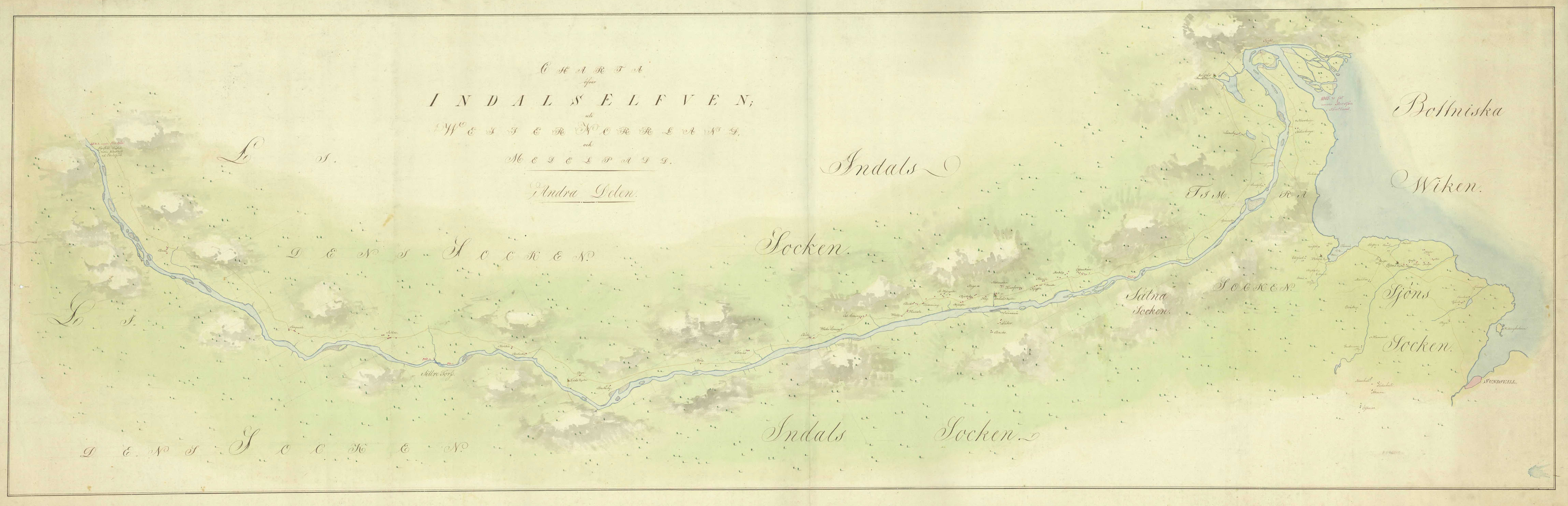 Karta över indalsälven från Storsjön till Bottenviken. Del 2 av 2.